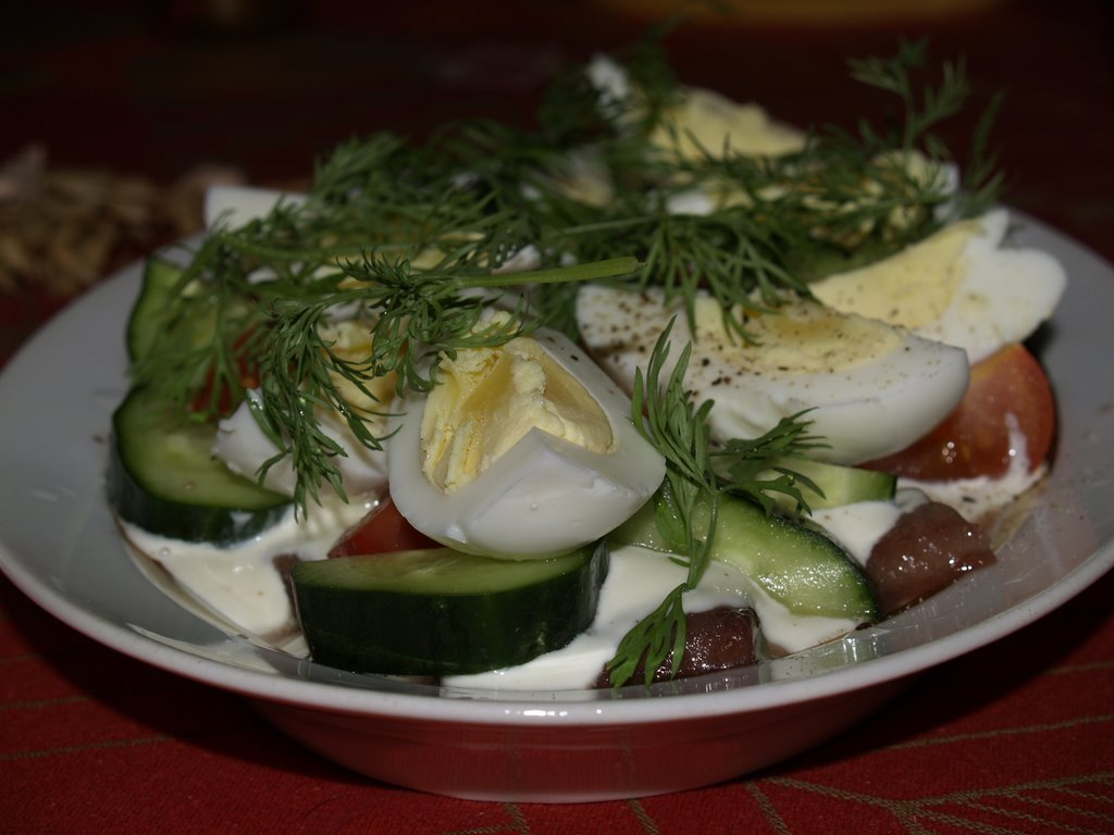 Sild